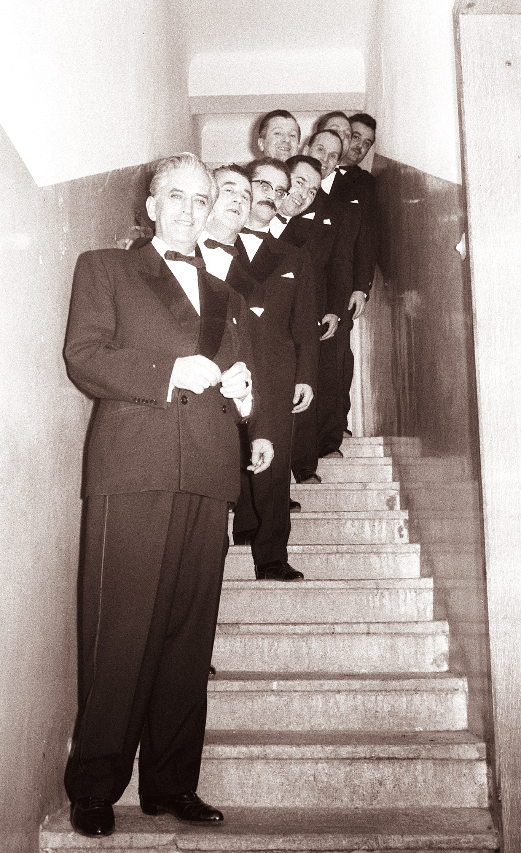 Slovenski oktet pred koncertom v Mariboru